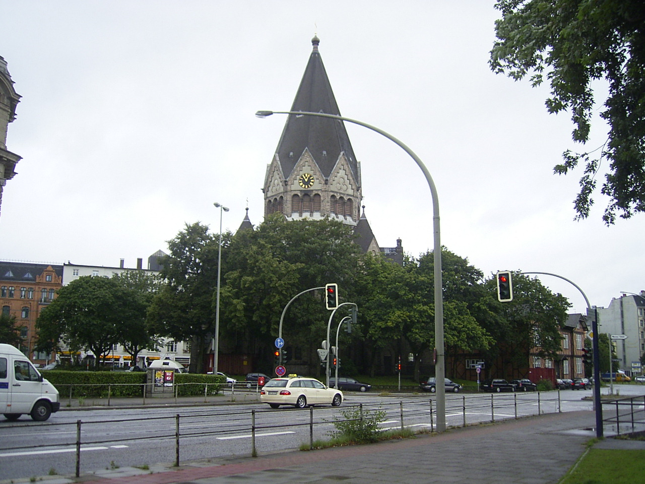 Die Gnadenkirche an der Karolinenstraße wurde 1906/07 von Fernando Lorenzen im neoromanischen Stil als Gemeindekirche für die Evangelisch-lutherische Kirchengemeinde St. Pauli-Nord erbaut. Inzwischen ist sie als Russisch-orthodoxe Kirche dem Heiligen Johannes von Kronstadt geweiht. This is a photograph of an architectural monument.